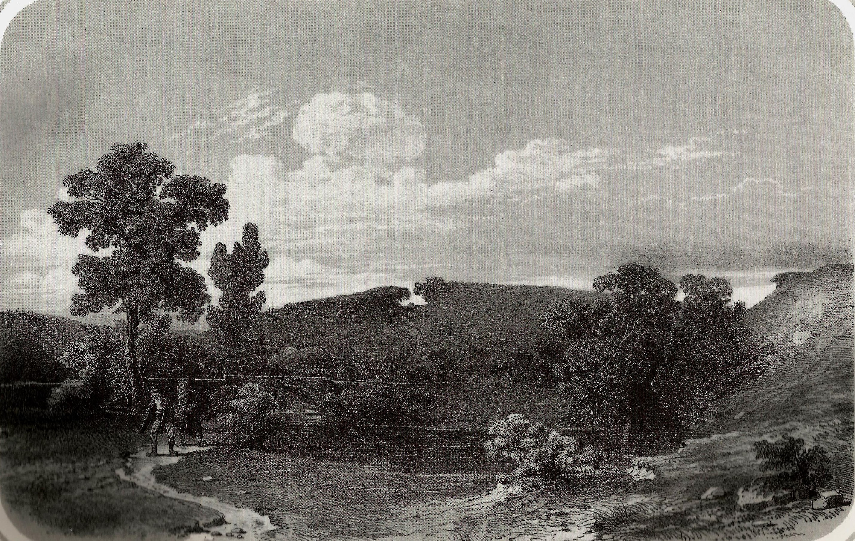 Le Pont Charron, à Chantonnay, gravure de Thomas Drake